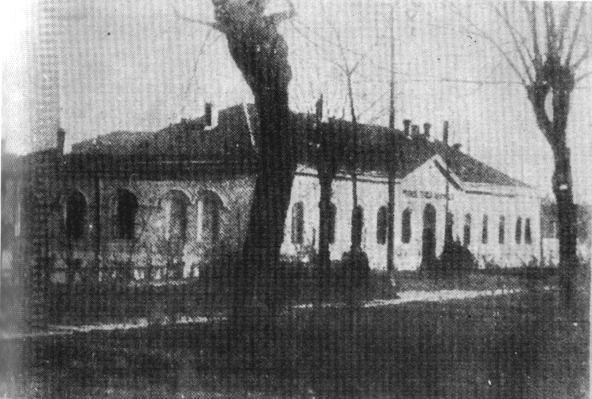 Srpskohrvatski / српскохрватски: Zloglasni beogradski zatvor Glavnjača.